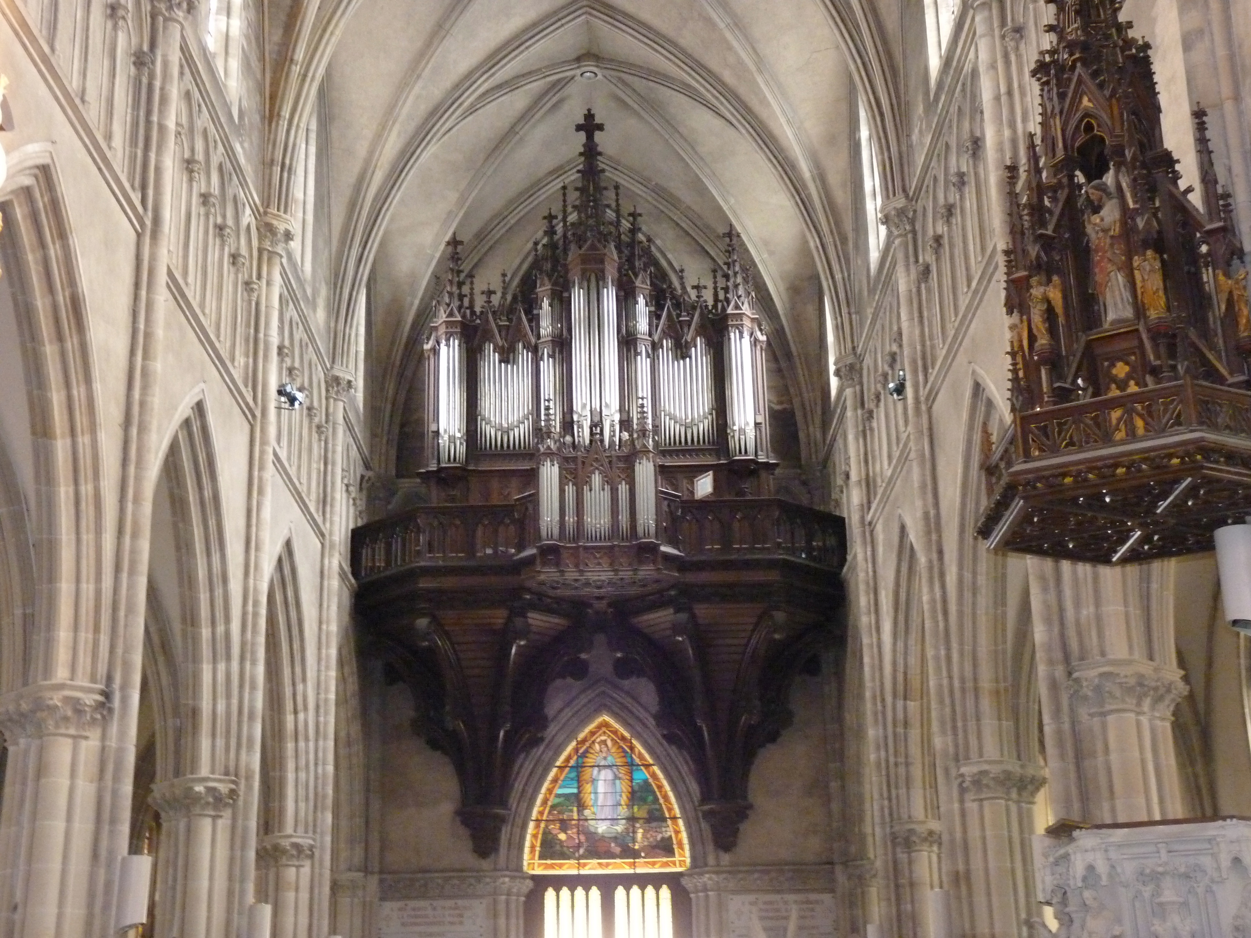 L'orgue, Église Saint-Amé, Plombières-les-Bains (Vosges, Lorraine, France)